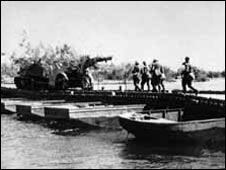 Понтонная переправа через Халхин-Гол была жизненно важна для советских войск